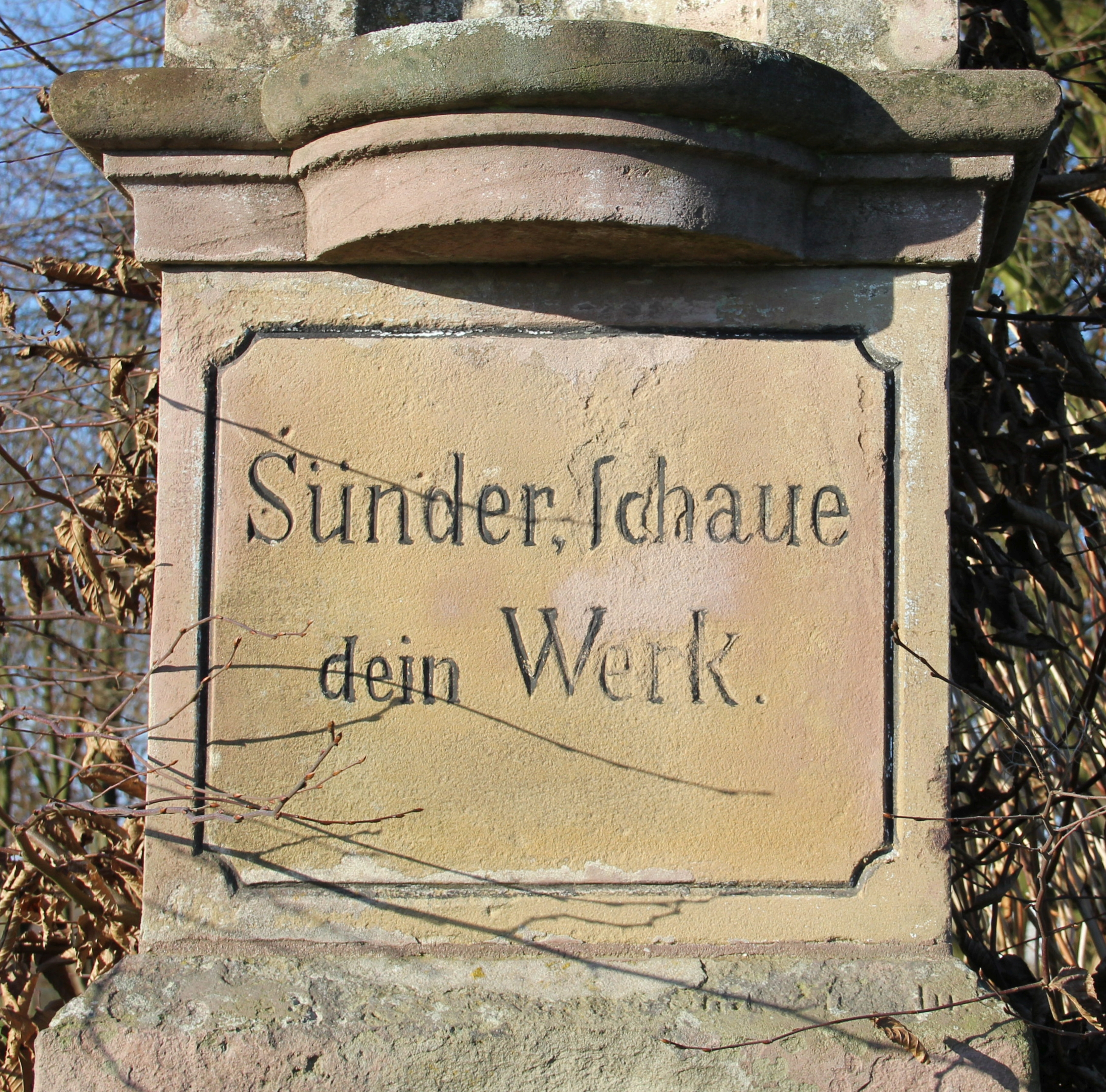 Wegekreuz in Lohmar - Weeg - Inschrift - Sünder schaue Dein Werk